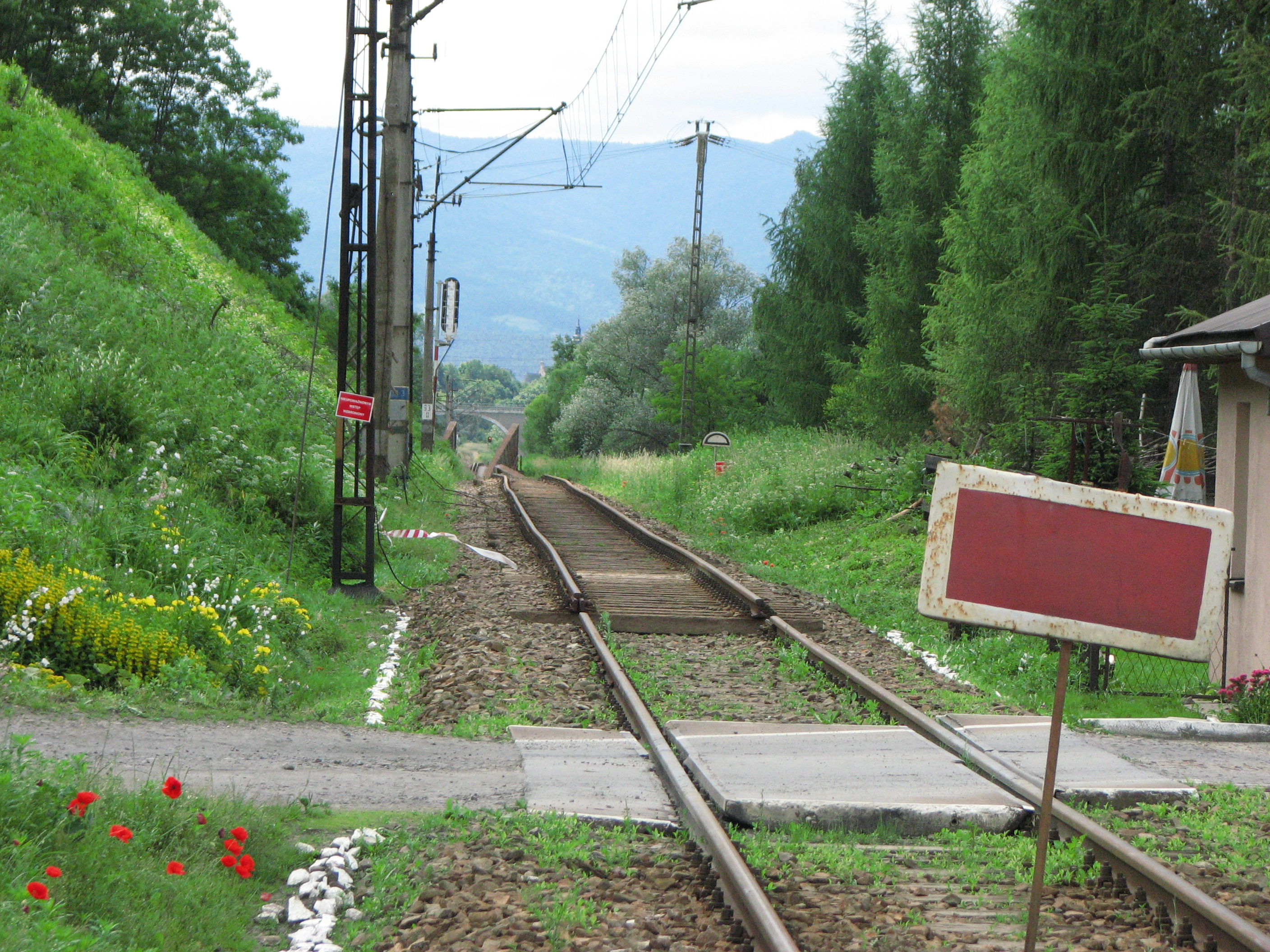 Linia kolejowa nr 96. Widok z przystanku Nowy Sącz - Biegonice w stronę zniszczonego wiaduktu na rzece Poprad.